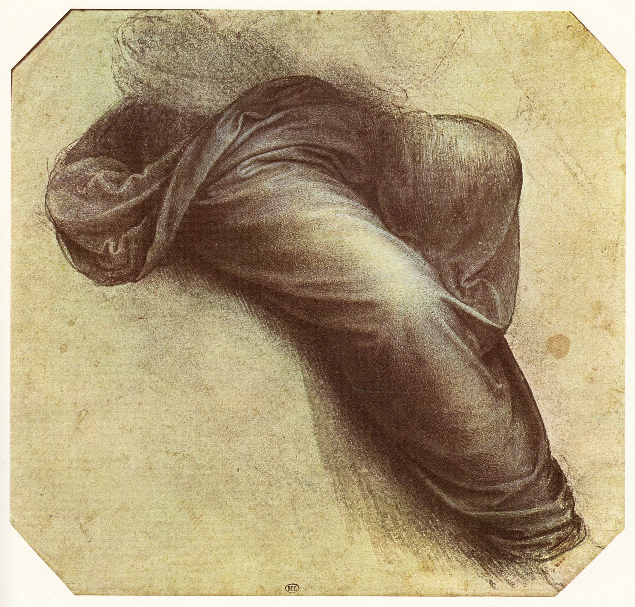 Leonardo da Vinci: Studio di panneggio per la Madonna con Sant'Anna matita nera, acquerello di china, biacca mm 230 x 245 Musée du Louvre, Cabinet des dessins INV 2257